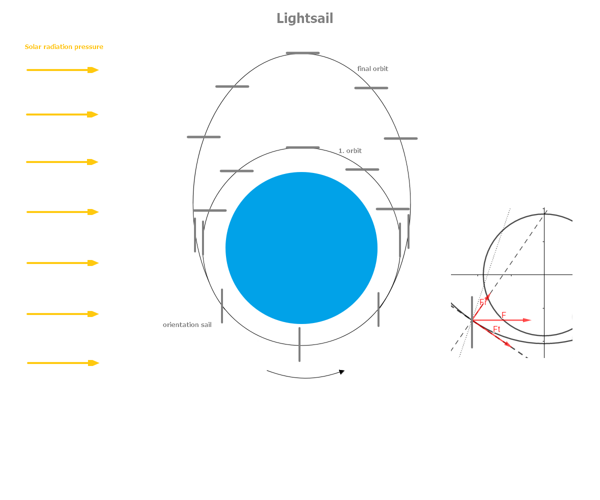 Orientácia plachty slnečnej plachetnice Lightsail 2, sily pôsobiace na plachtu a zvyšovanie obežnej dráhy.